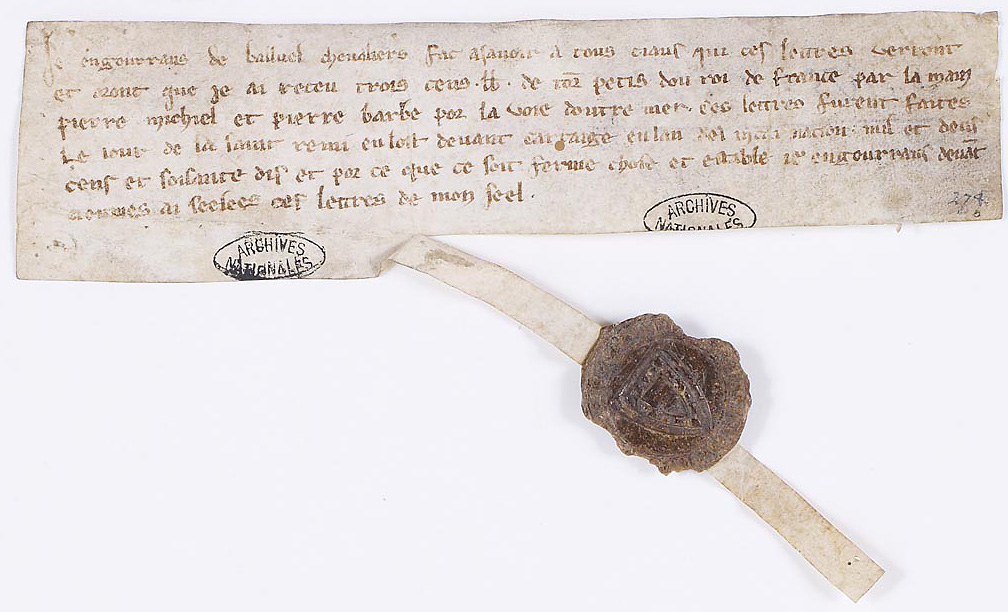 Quittance délivrée aux officiers du roi par un chevalier, Enguerran de Bailleul pour le paiement des gages qu’il a reçu à l’occasion de la Croisade, 1er octobre 1270